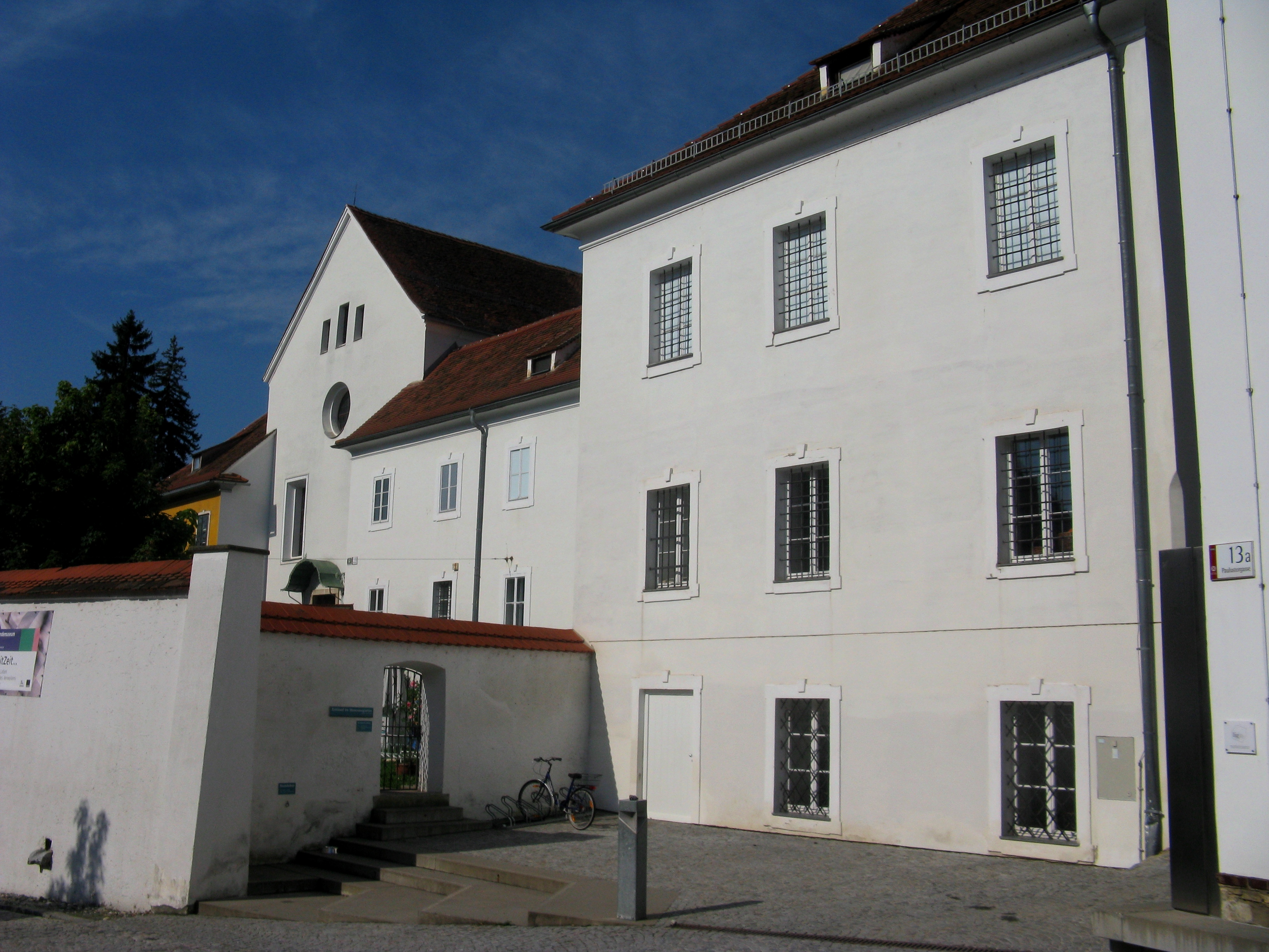 Ehem. Kapuzinerkloster, Volkskundemuseum